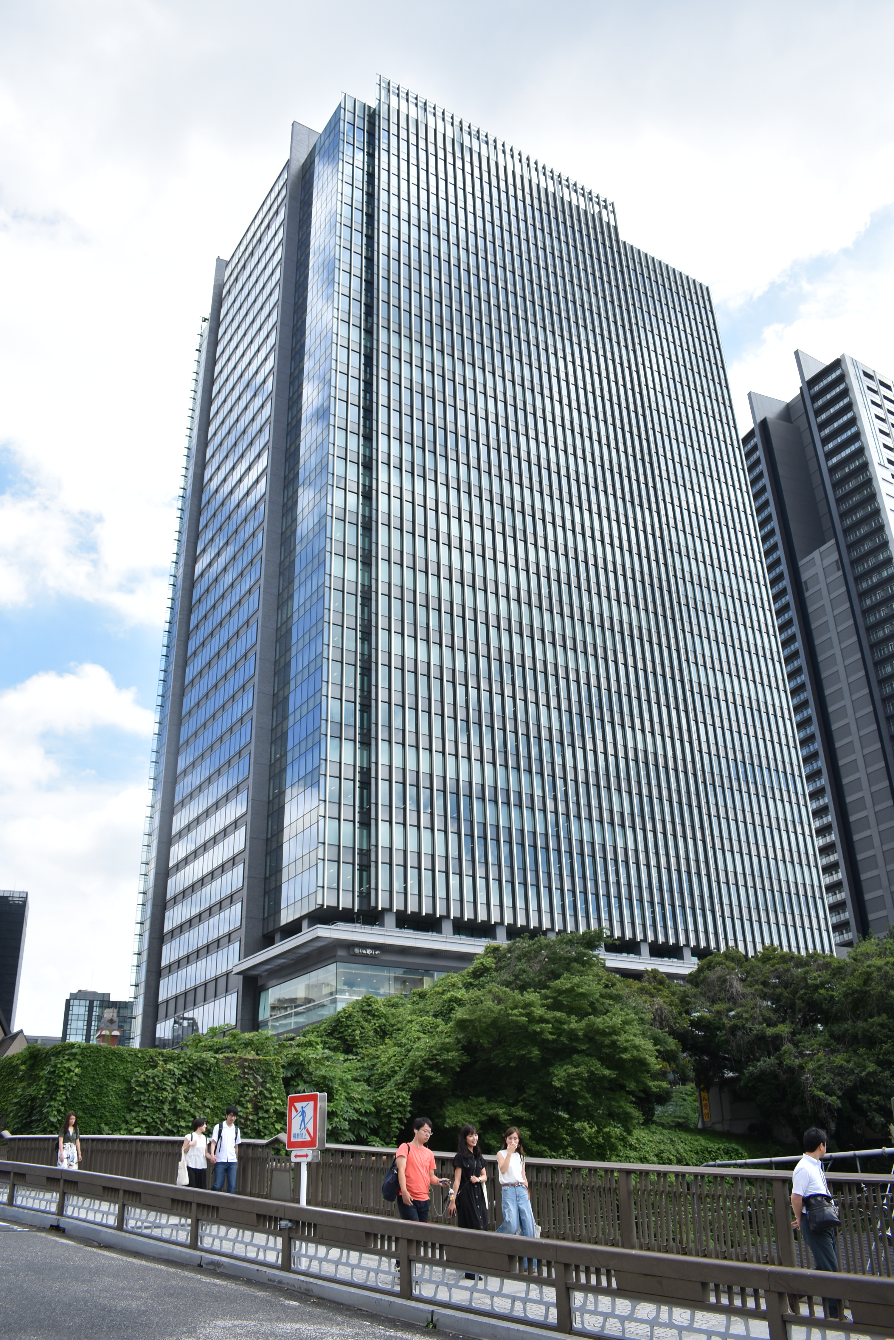 飯田橋サクラテラス